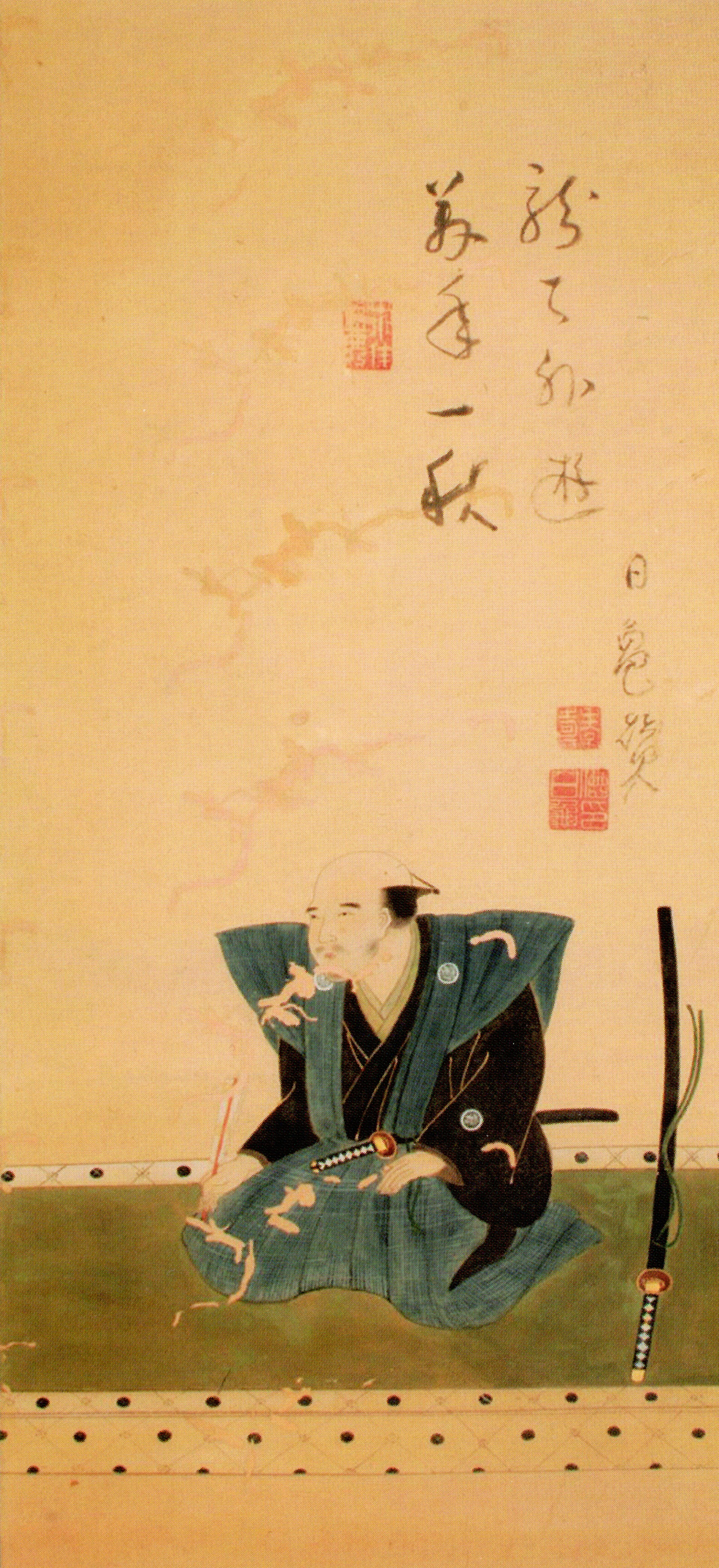 村井長穹の肖像。